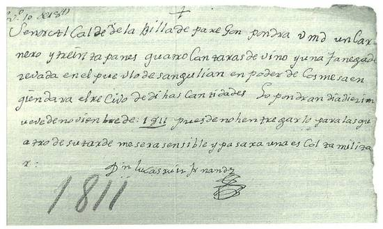 Nota escrita por un guerrillero al alcalde de Pradejón en 1811, pidiéndole víveres. "Un carnero y treinta panes, cuatro cántaras de vino y una fanega de cebada".